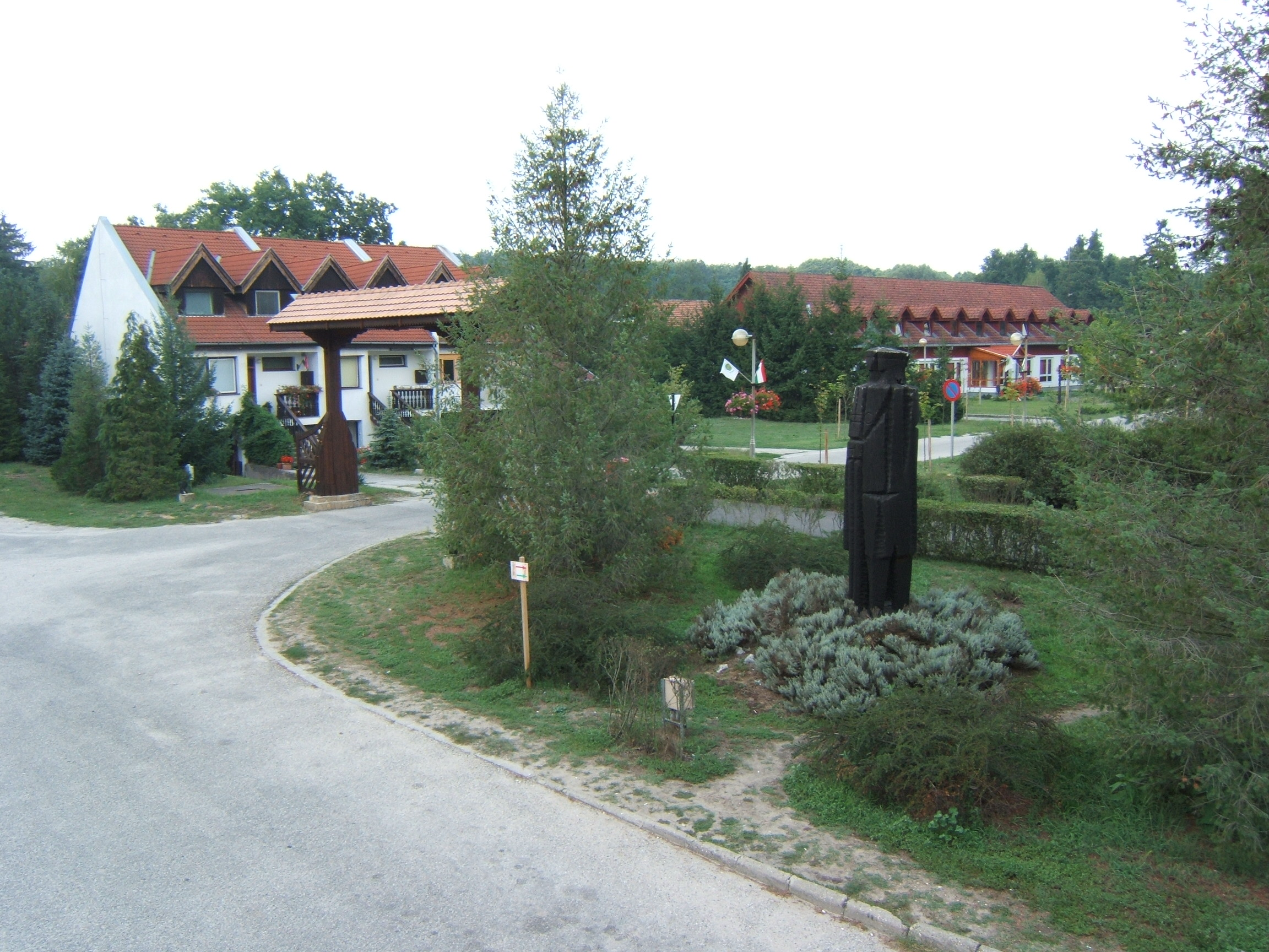 Kaszó, épületek